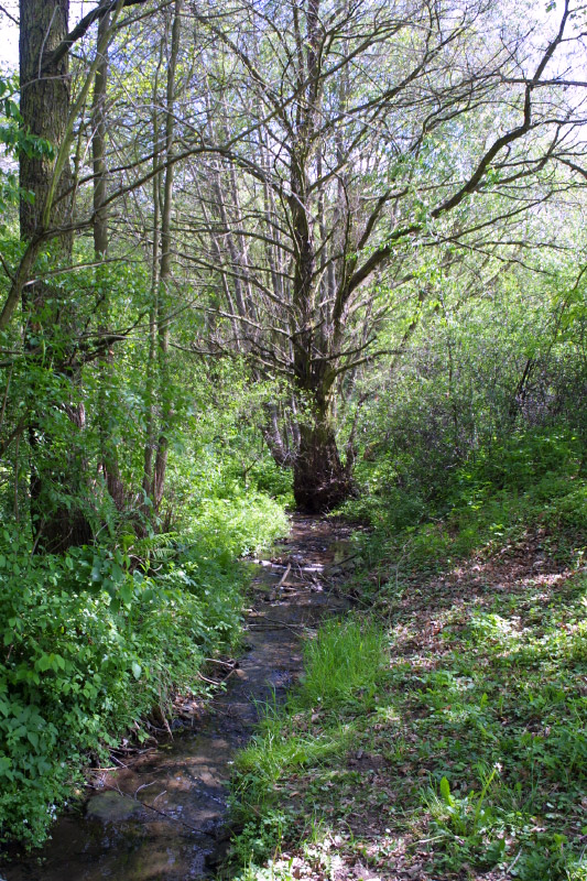 Dolanský potok.